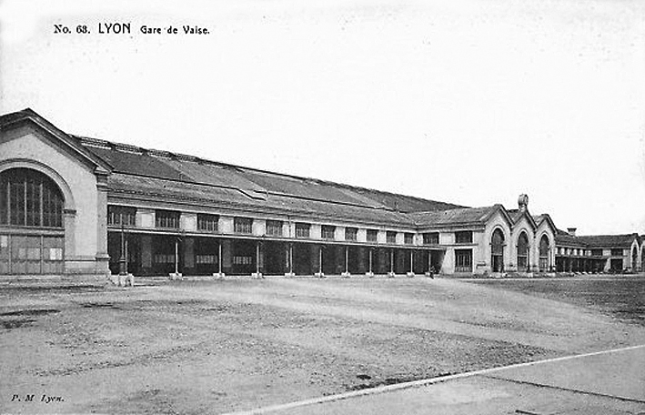 Le premier bâtiment voyageurs, avec sa grande nef, de la gare de Lyon-Vaise. Vu vers 1900.